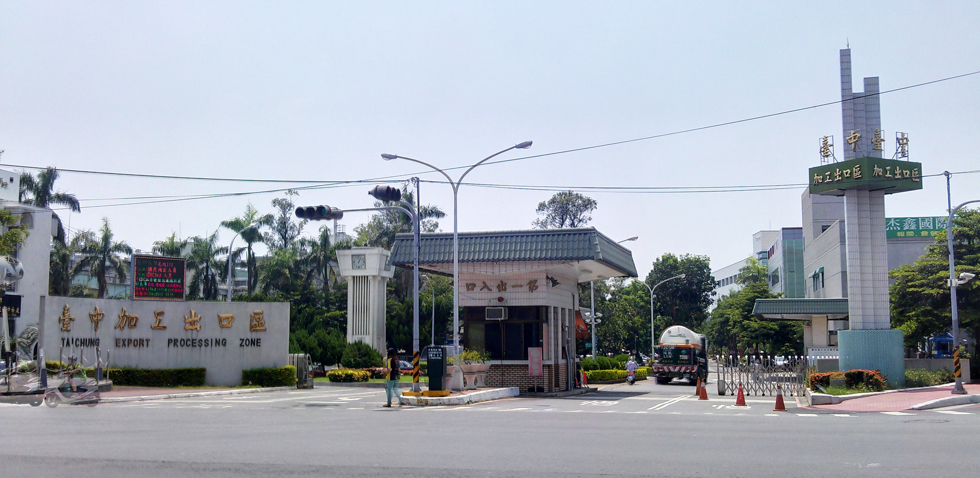 中文（台灣）: 台中加工出口區